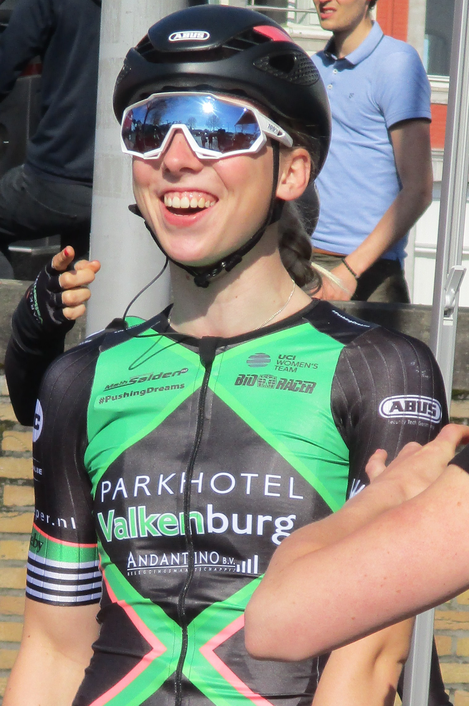 Start van de Amstel Gold Race Ladies Edition 2018 in Maastricht.